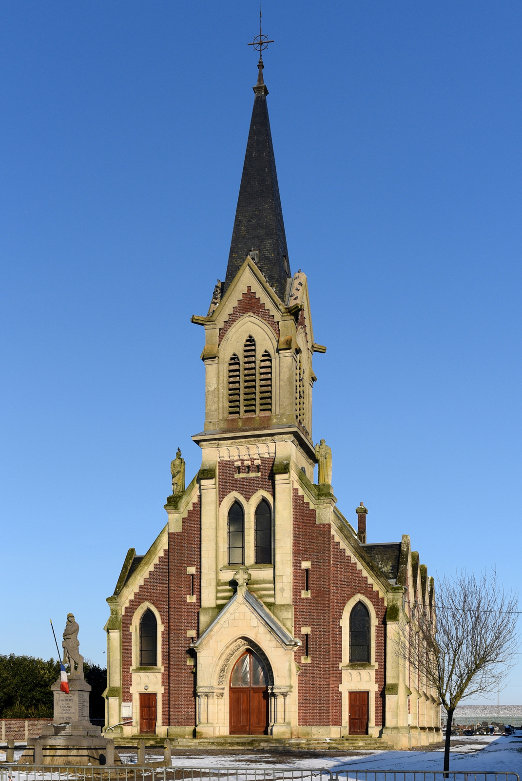 Eglise néogothique typique de la Reconstruction